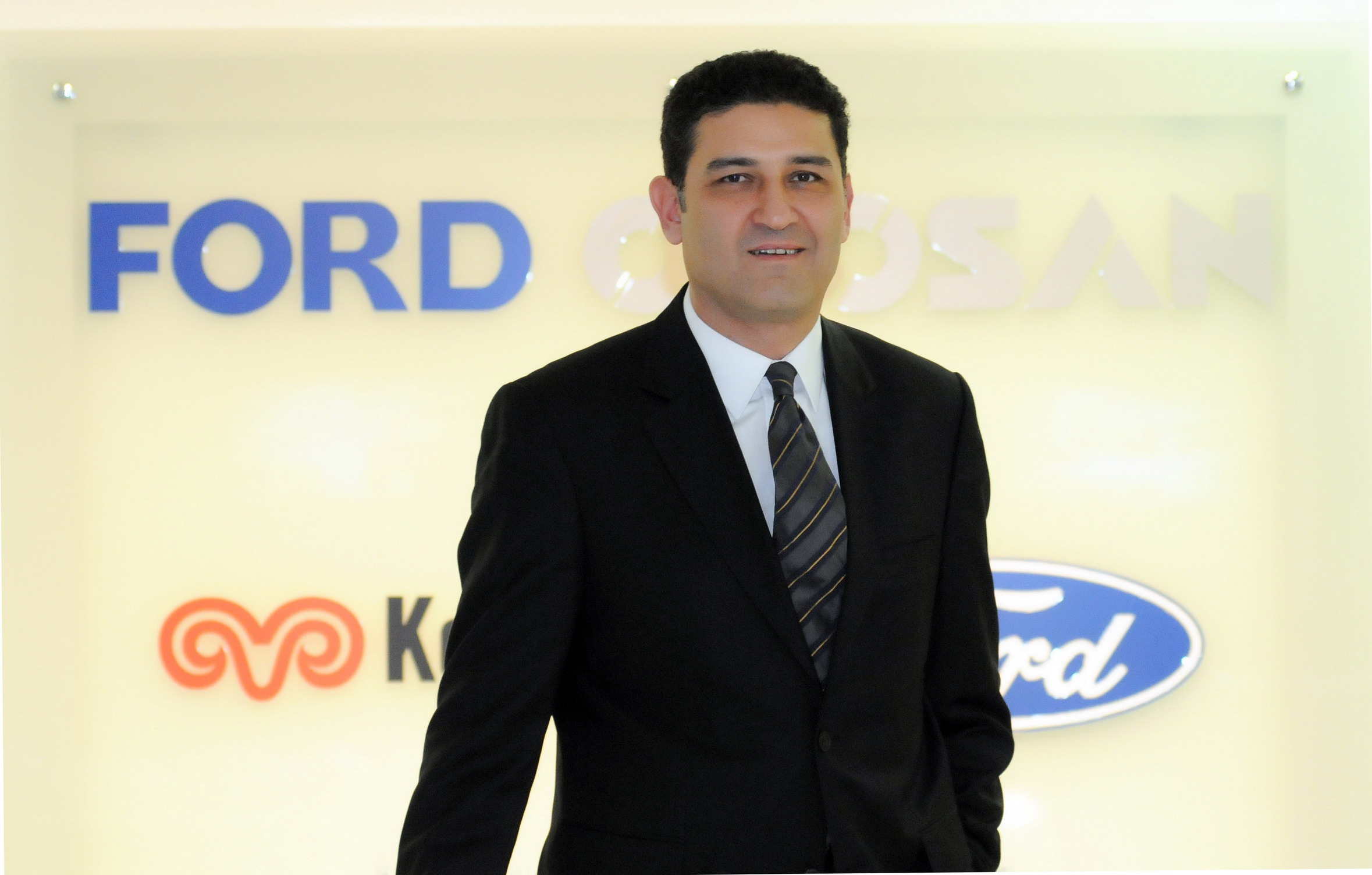 Ford Otosan Genel Müdürü Haydar Yenigün